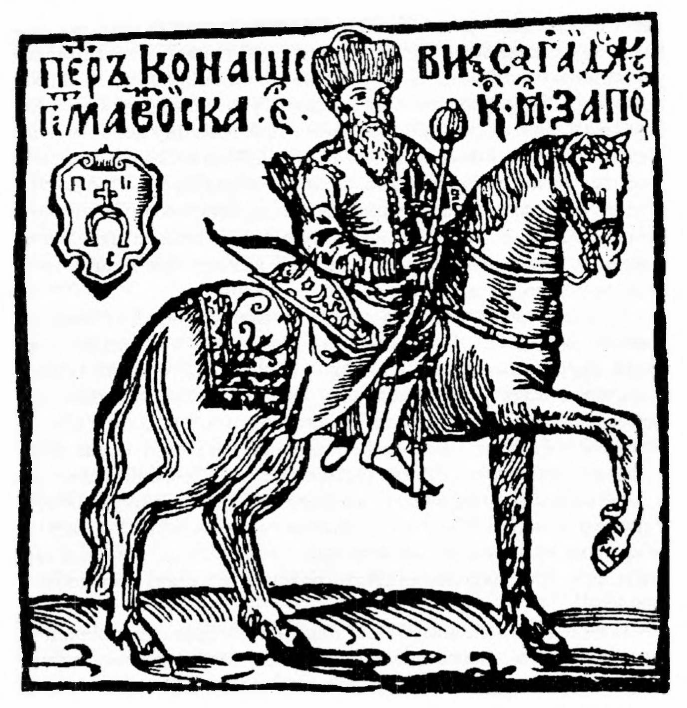 Гетьман Сагайдачний: Петро Сагайдачний. Гравюра на дереві з книжки Касіяна Саковича «Вірші на жалісний погреб шляхетного лицаря Петра Конашевича-Сагайдачного»